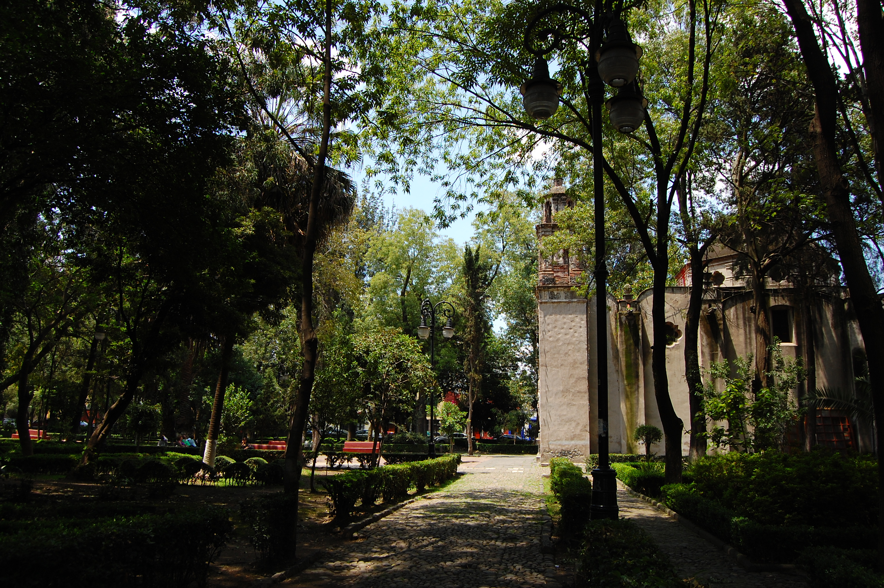 iglesia de la Conchita en Coyoacan.